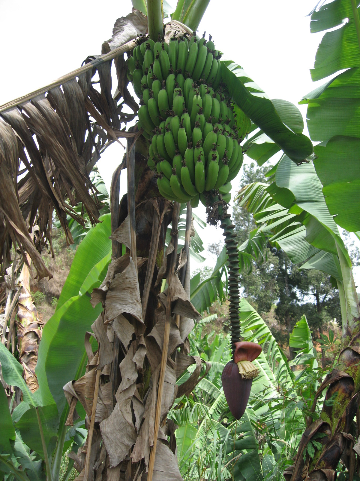 Bananier aux environs de Bana, Cameroun/Banana tree near Bana, Cameroon